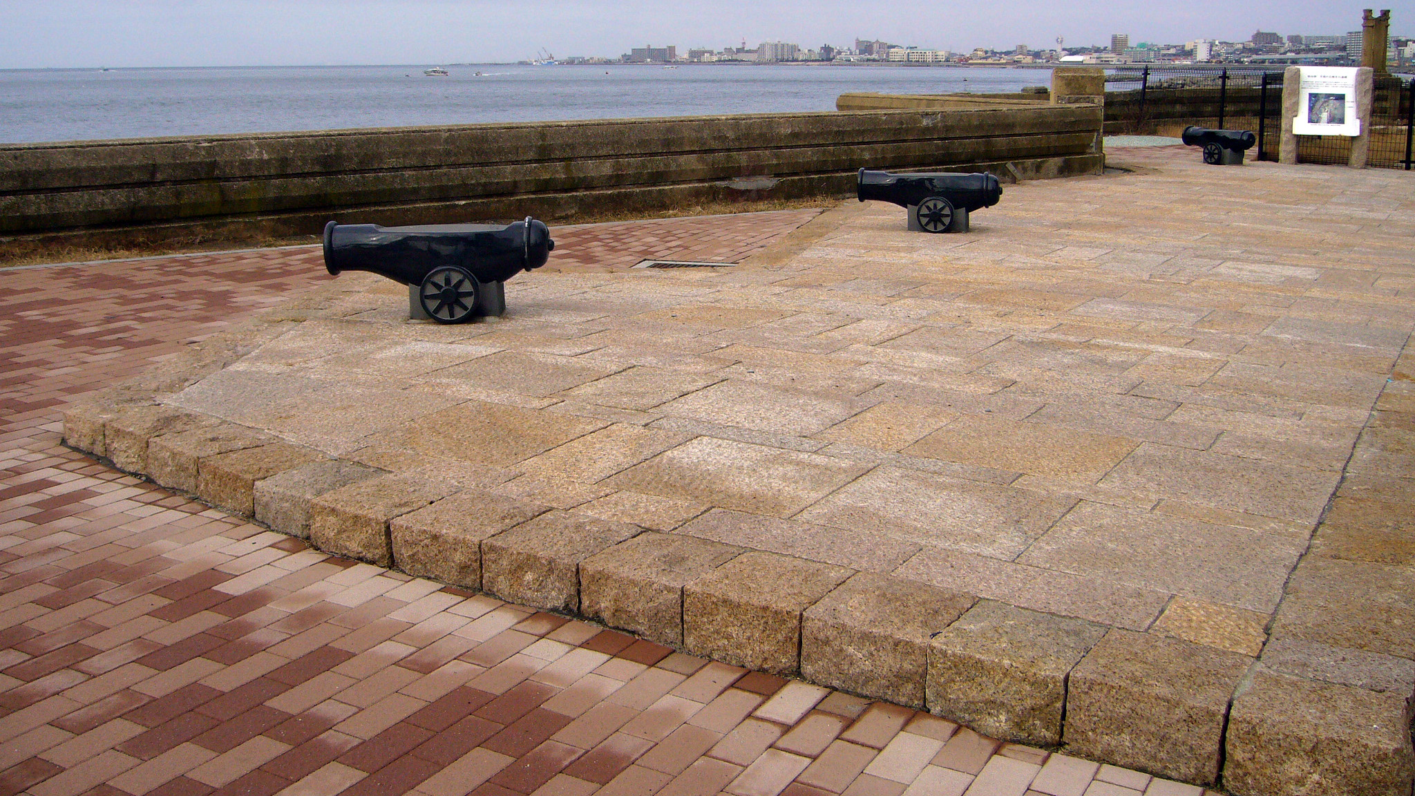 Akashihan-Maikodaiba-ato in Kobe, Hyogo, Japan